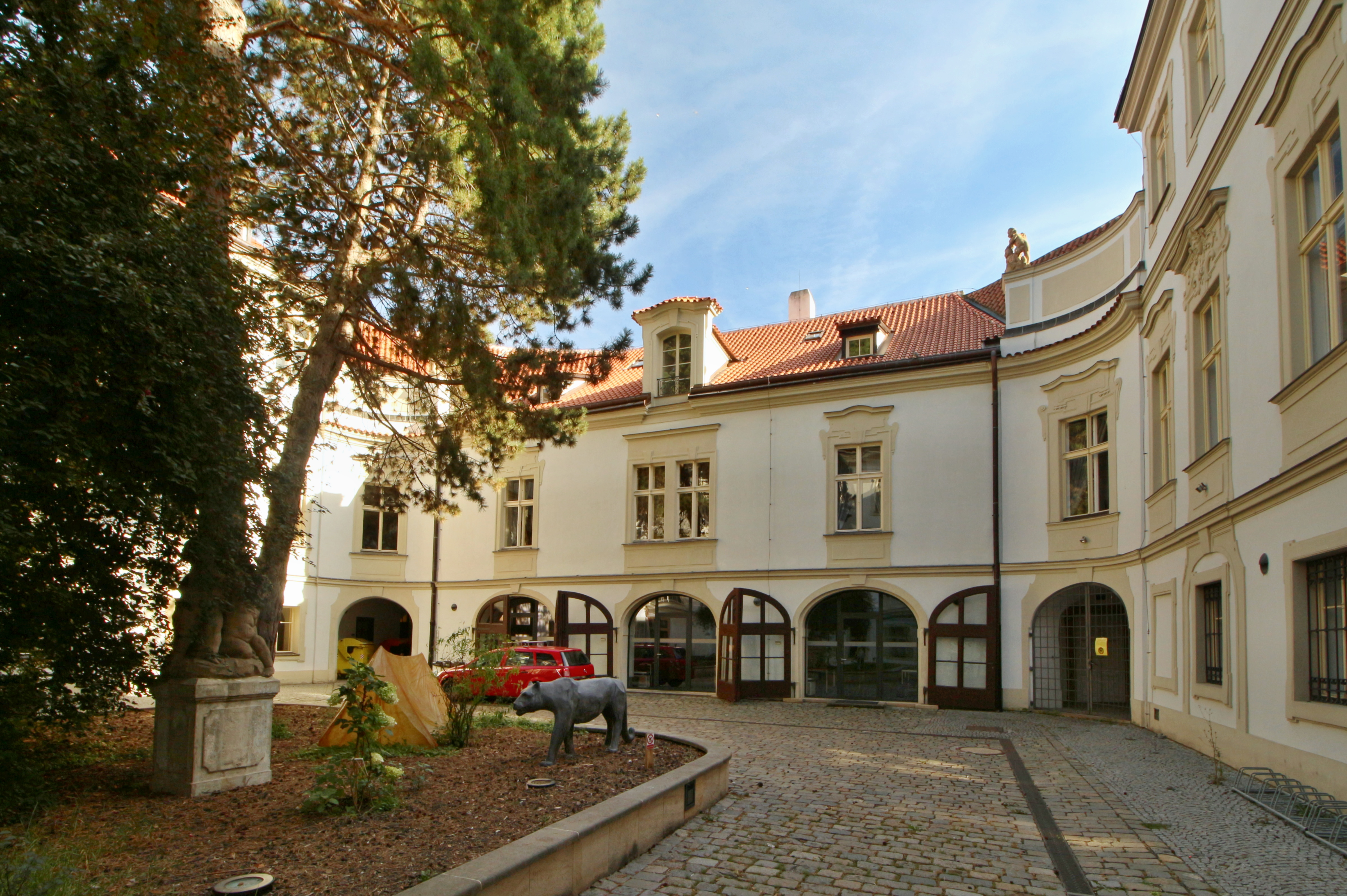 Praha 1-Malá Strana, Letenská ulice